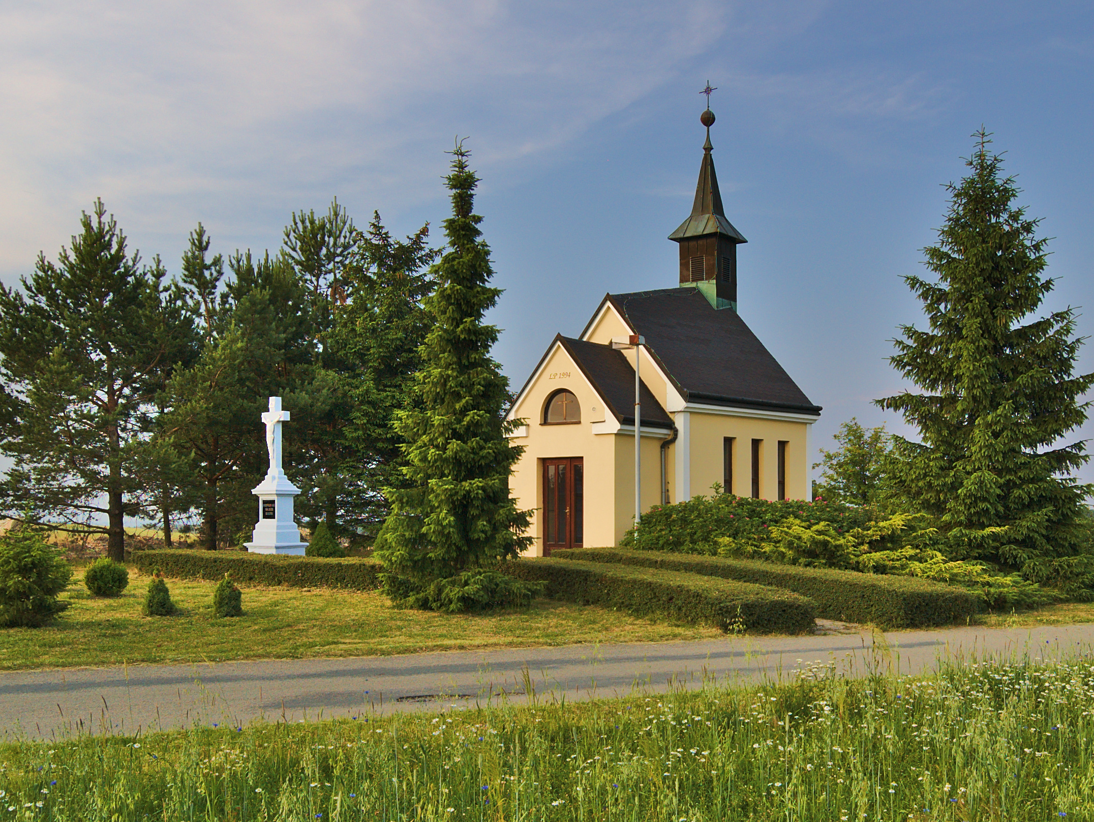 Kaple Panny Marie Bolestné, Pavlov, Benešov, okres Blansko